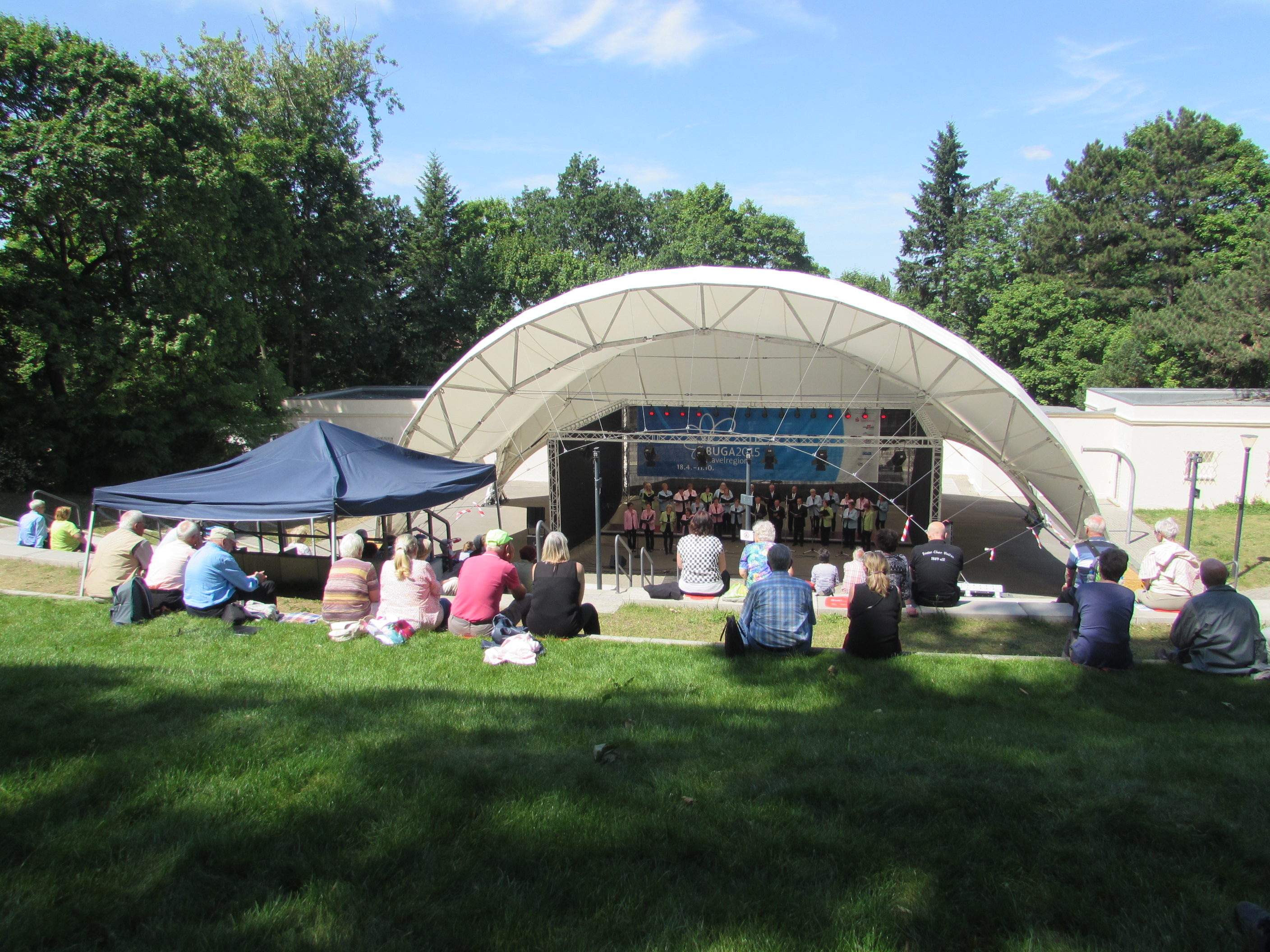 freilichtbühne brandenburg auf dem marienberg